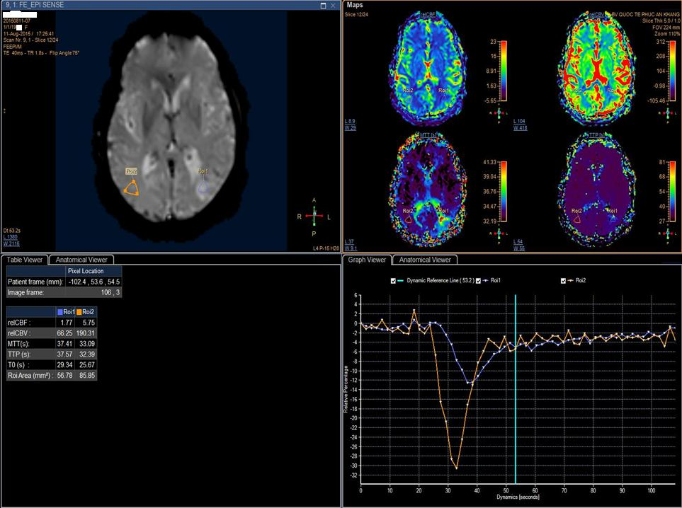 MRI tưới máu T2*W với Gadovist